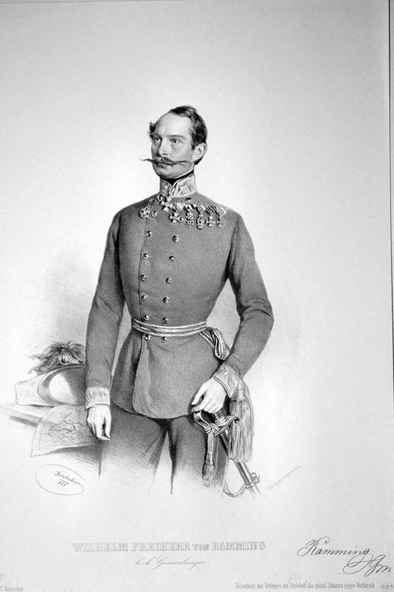 Wilhelm Ramming von Riedkirchen, Lithographie von Josef Kriehuber, 1855